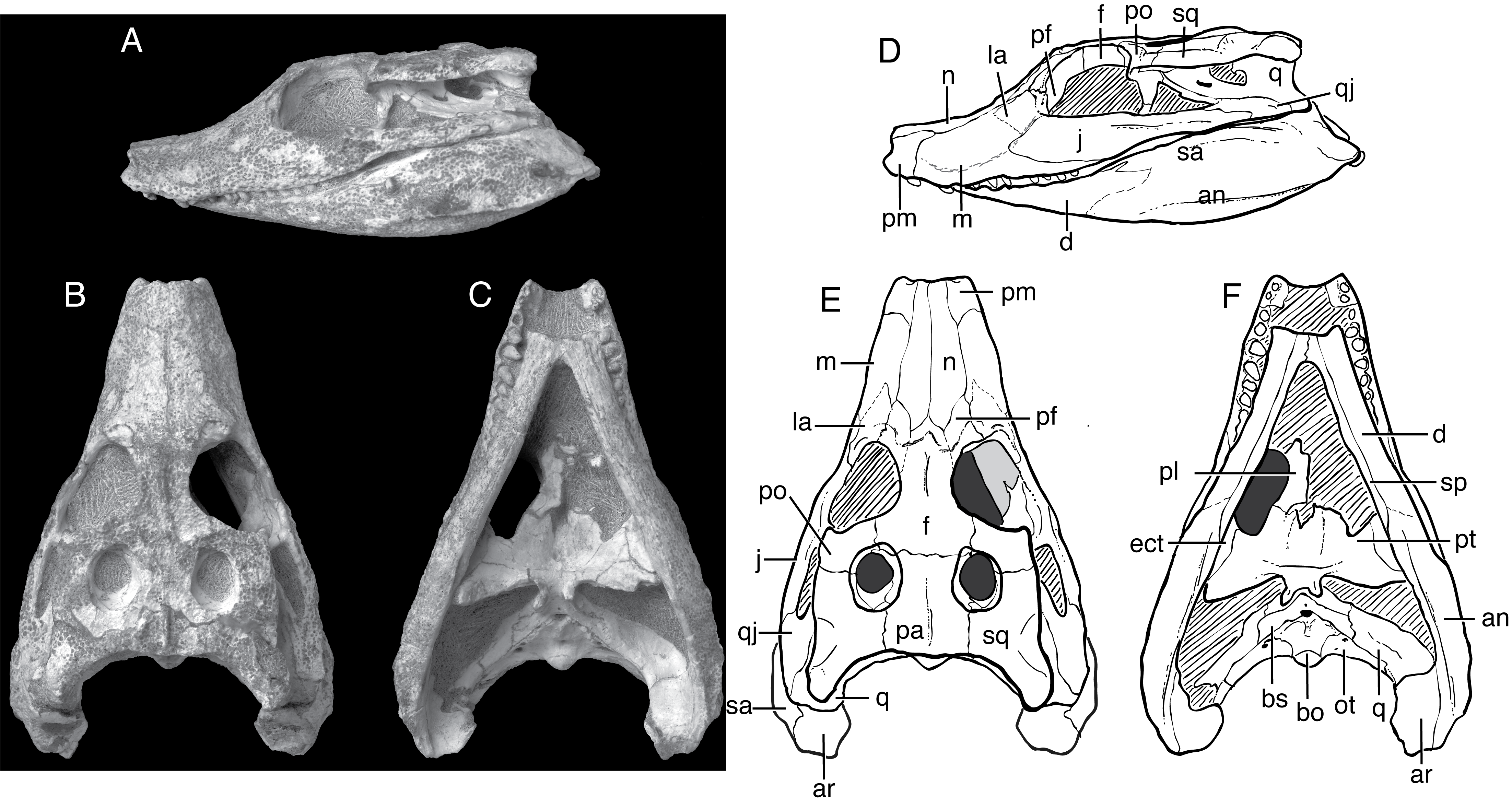 IGM 100/1195, Shamosuchus djadochtaensis, Djadokhta Fm., Campanian, Mongolia. Photographs in A, lateral, B, dorsal, C, ventral views. Line drawings in D, lateral, E, dorsal, F, ventral views. Abbreviations: an, angular; ar, articular; bo, basioccipital; bs, basisphenoid; d, dentary; ect, ectopteryoid; f, frontal; j, jugal; la, lacrimal; m, maxilla; n, nasal; ot, otoccipital; pa, parietal; pf, prefrontal; pl, palatine; pm, premaxilla; po, postorbital; pt, pterygoid; q, quadrate; qj, quadratojugal; sa, surangular; sp, splenial; sq, squamosal.